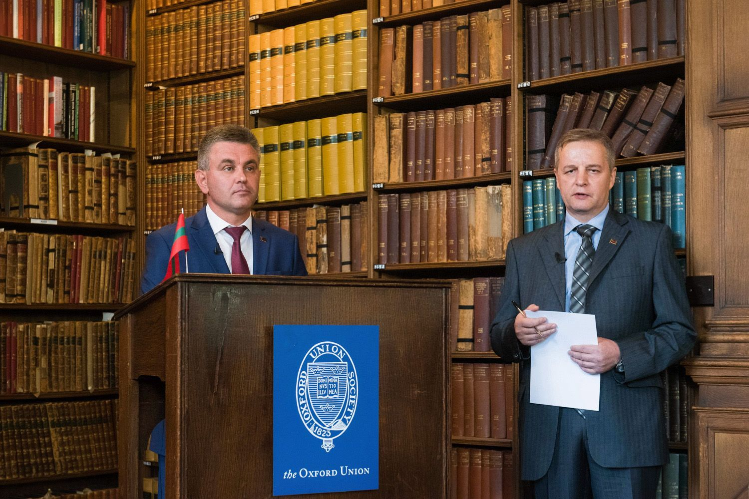 Президент Приднестровья Вадим Красносельский в Оксфорде